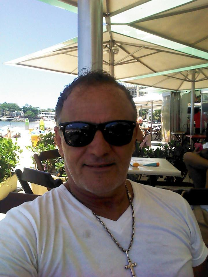 Passeio em Copacabana